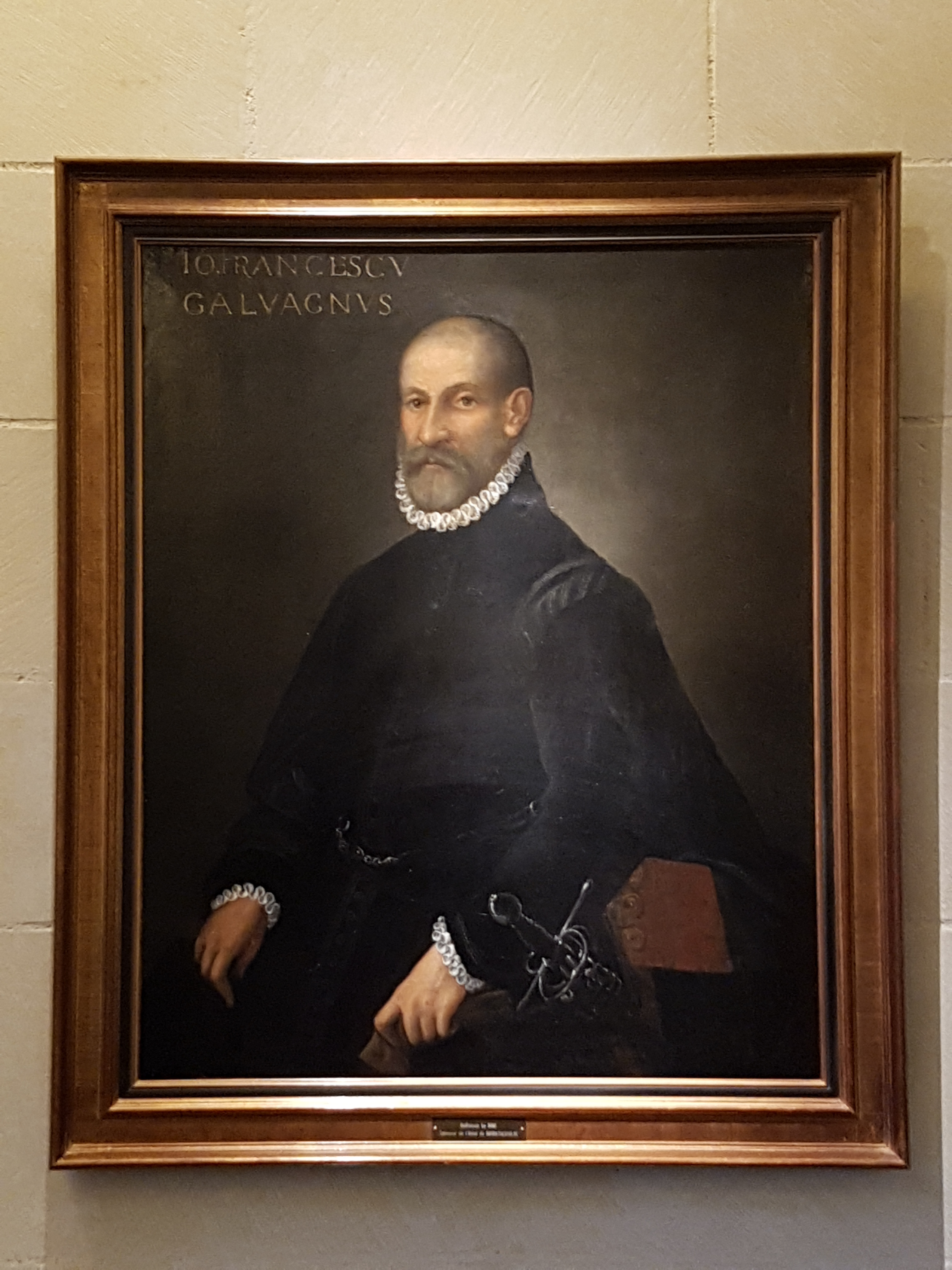 Tableau de Guillaume Le Roux († 1520), seigneur de Bourgtheroulde, bâtisseur de l'hôtel de Bourgtheroulde à Rouen.